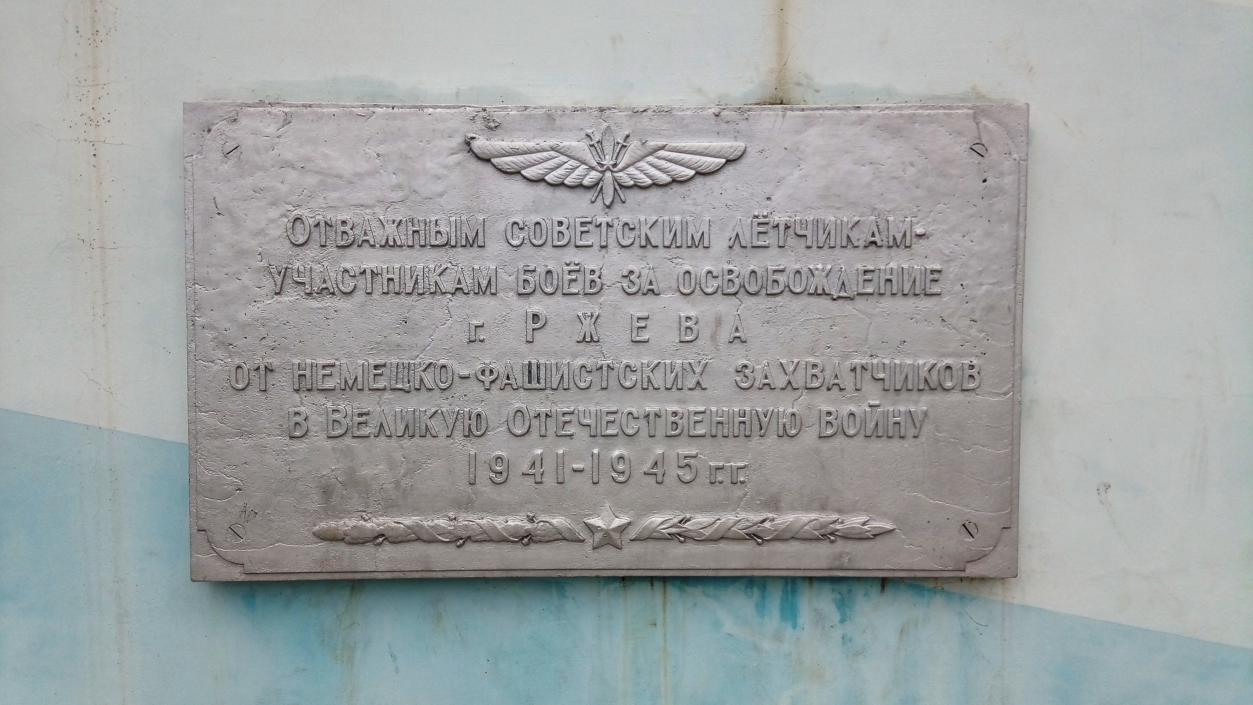 Аннотационная доска на памятник советским лётчикам (Ржев)